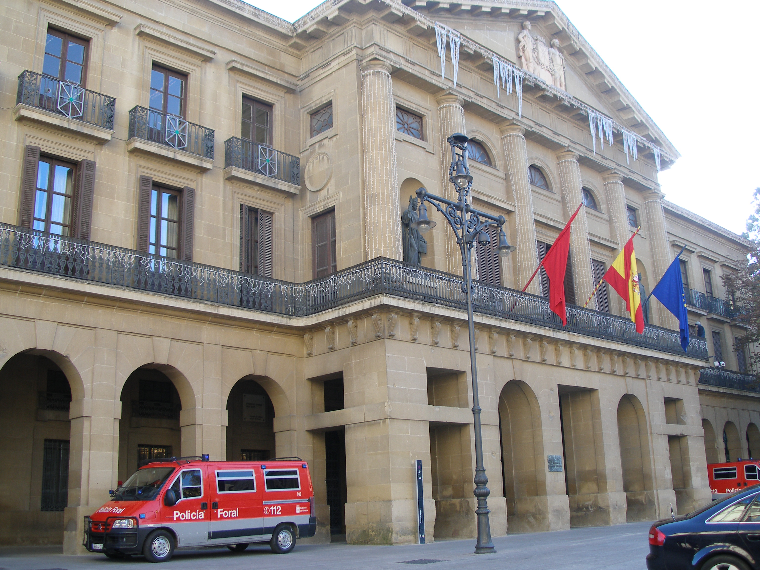 Fachada del Palacio de Navarra en Pamplona (España).